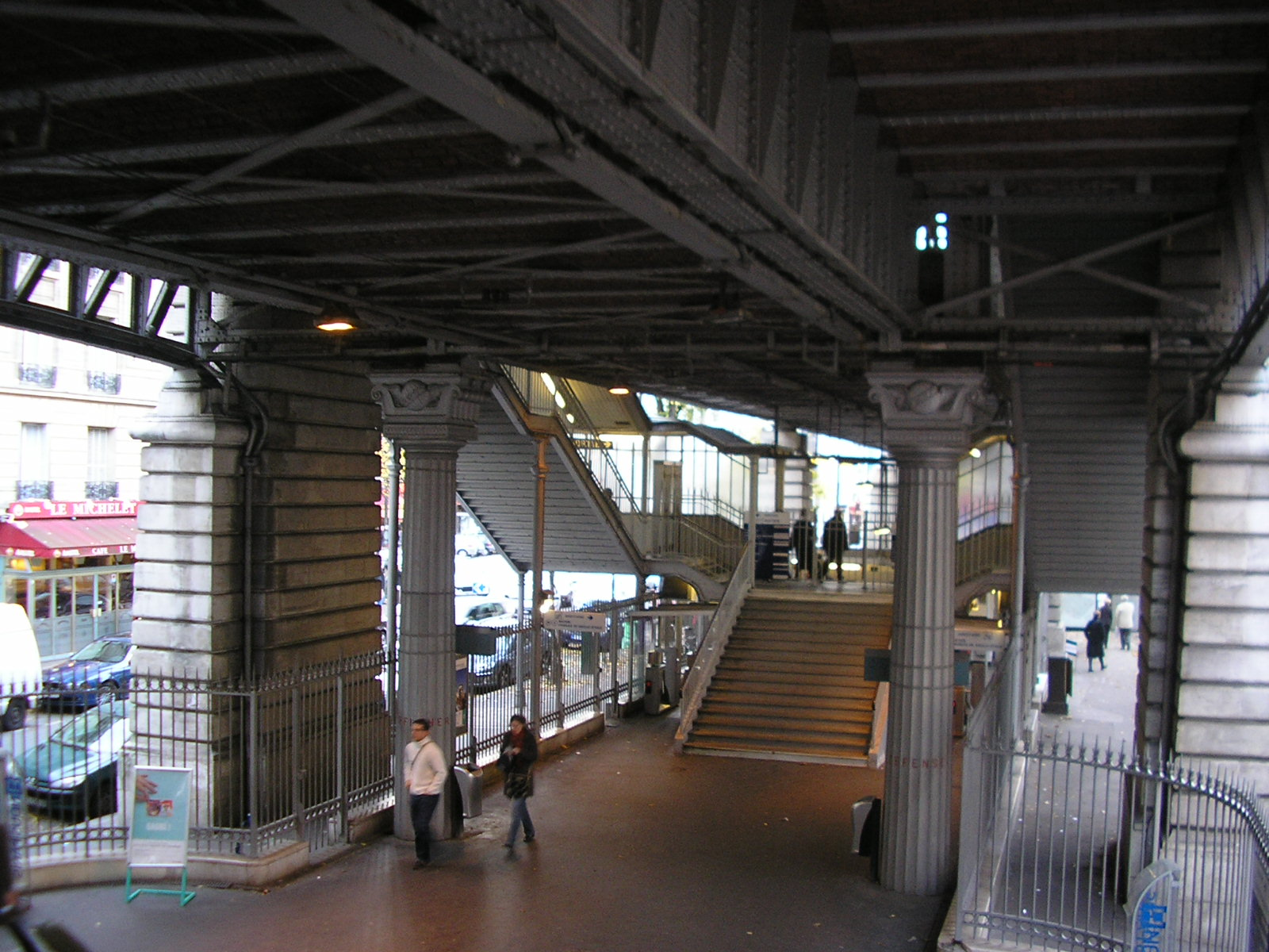 Le métro aérien.